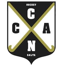 Emblema de Central Norte Jockey, equipo de Jockey sobre hierba.